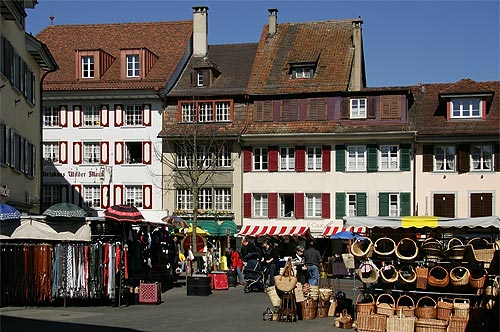 Markttag in Sursee (Unterstadt)